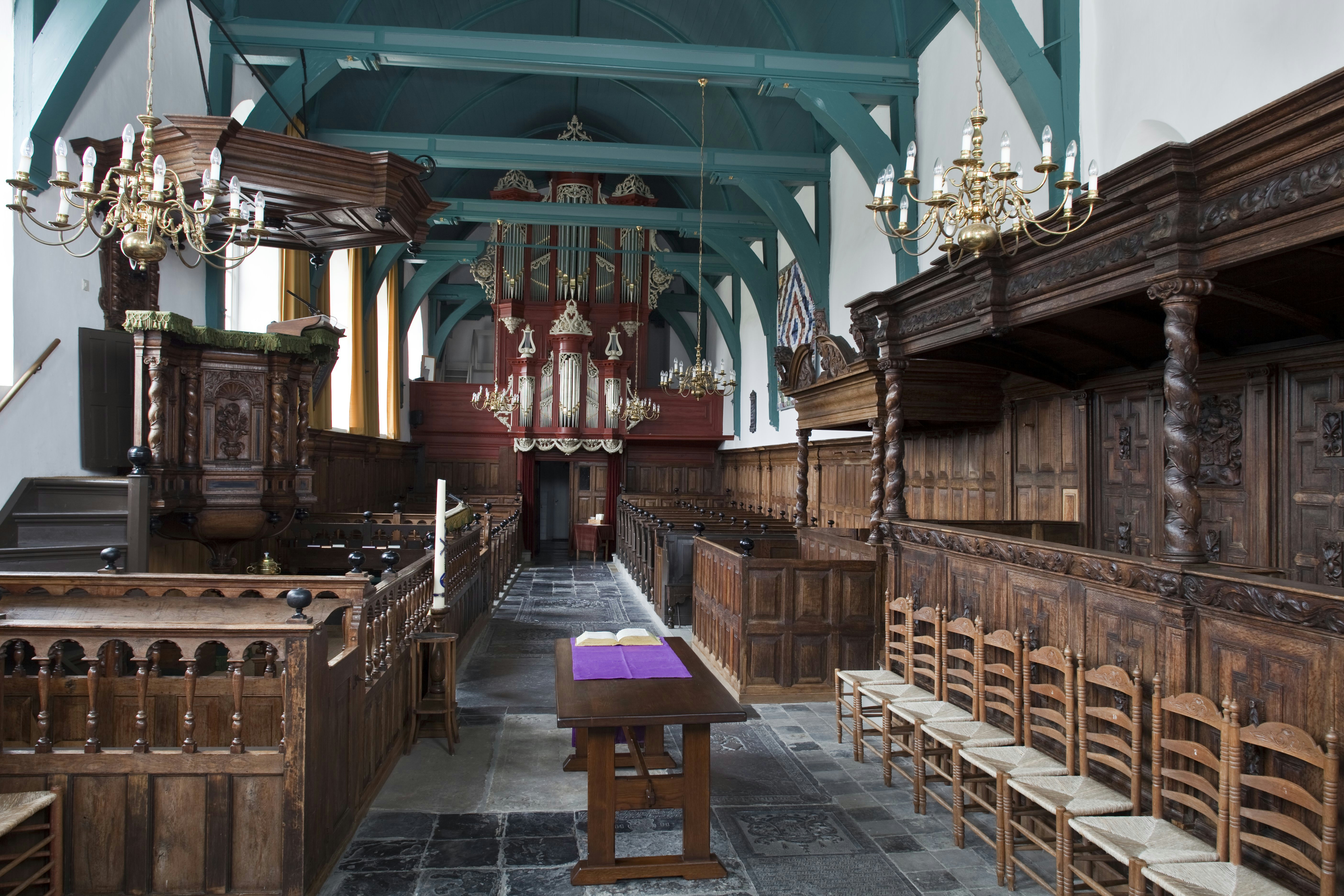 Nederlands Hervormde Kerk: Interieur, overzicht gezien vanuit het koor